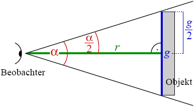 Scheinbare Größe bei rechteckigem Klotz. Das mit Beobachter markierte runde Etwas stellt ein Auge dar.